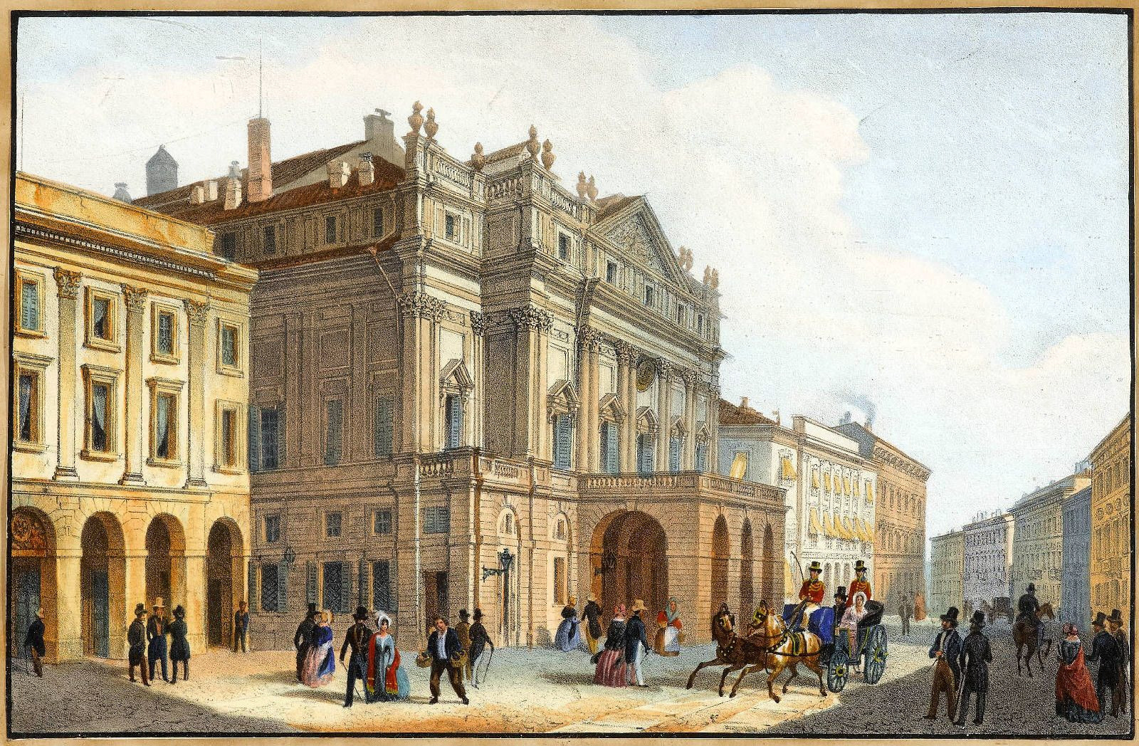 Mailand - Blick auf das Teatro della Scala. Kolorierte Lithographie. Ca. 16 x 24,5 cm. Italien 2. Viertel 19. Jh.